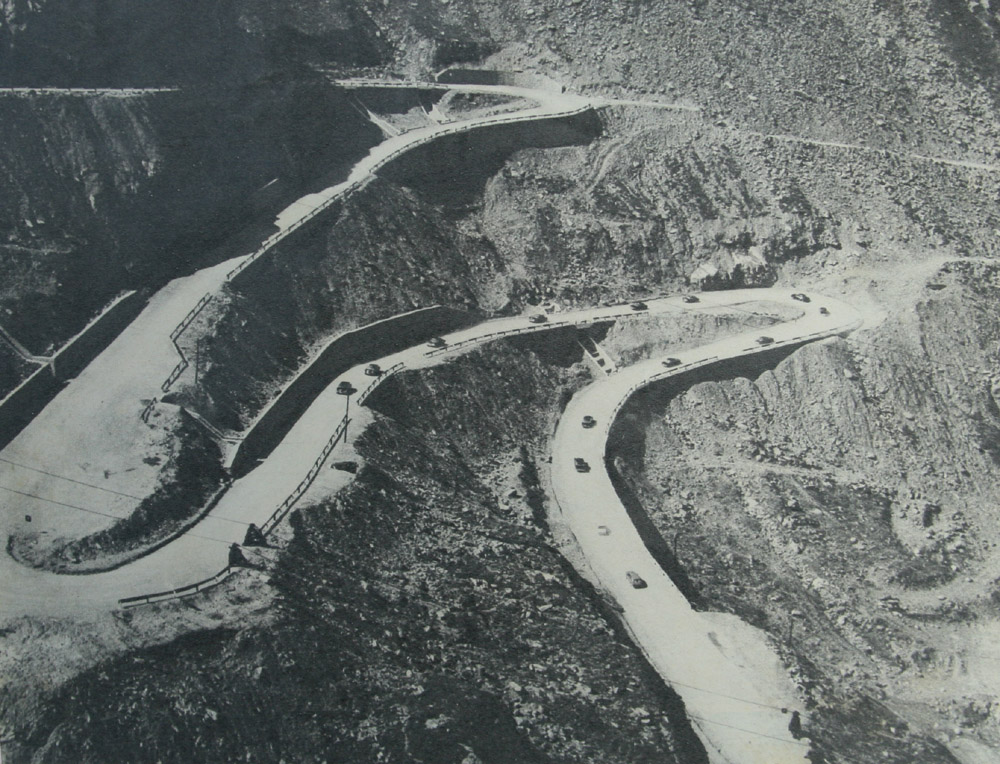 Transfăgărăşan road in 1974.